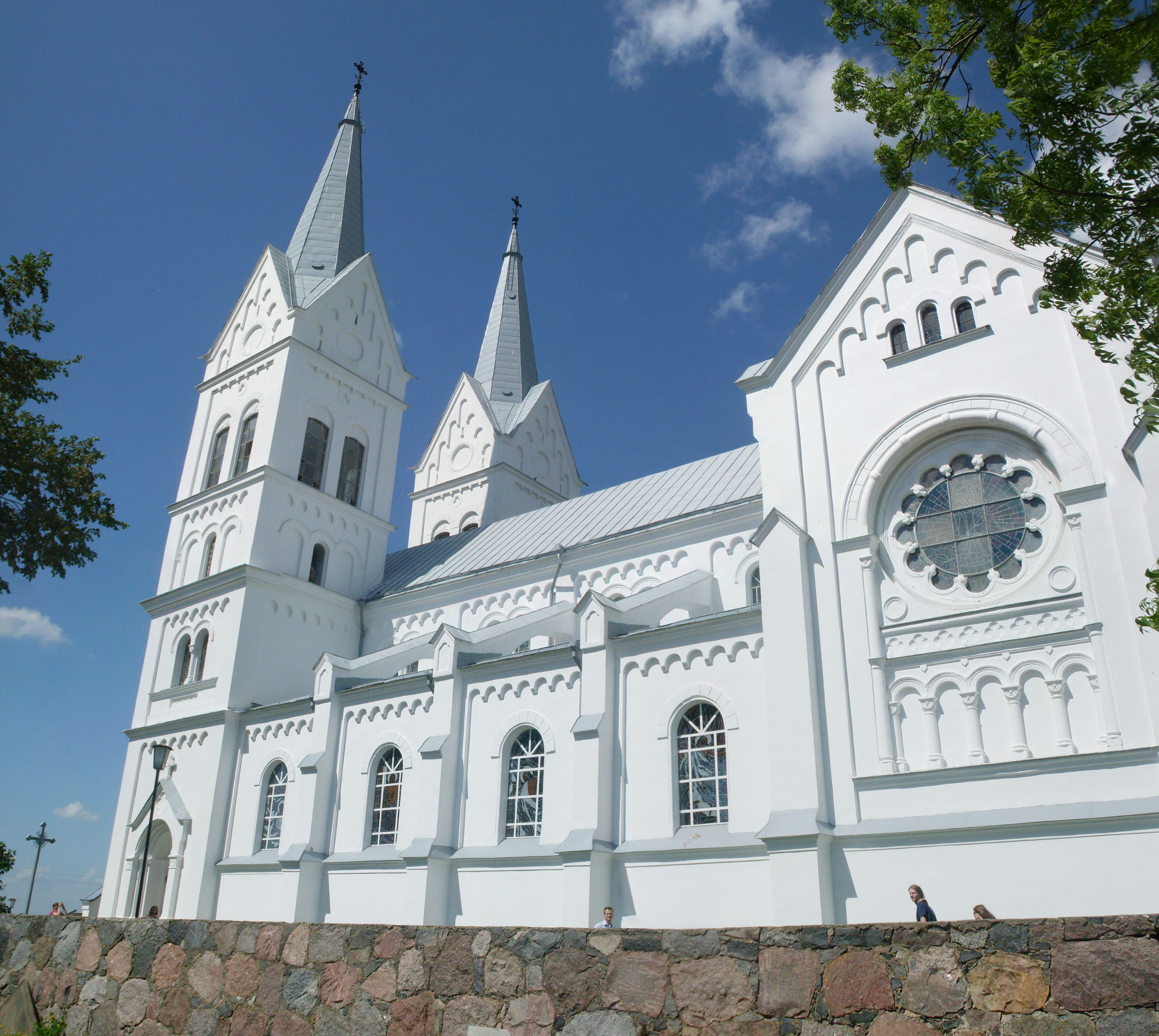 Беларуская (тарашкевіца): Касьцёл Сэрца Ісуса уваходныя дзверы. в. Слабодка This is a photo of Belarusian heritage monument. Reference number: 212Г000212 ( WLM)